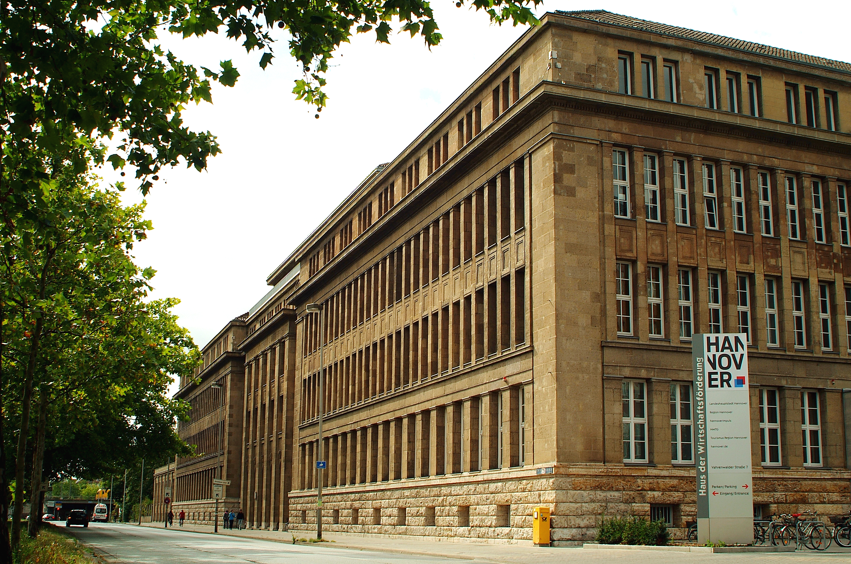 Das Haus der Wirtschaftsförderung wirkt selten so ruhig wie hier; die Vahrenwalder Straße ist eine der meistbefahrenen Straßen in Hannover ...